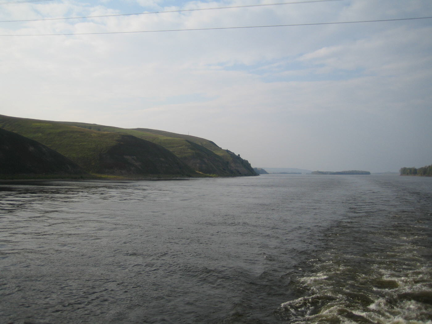 устье р. Вятка (09.09.05)